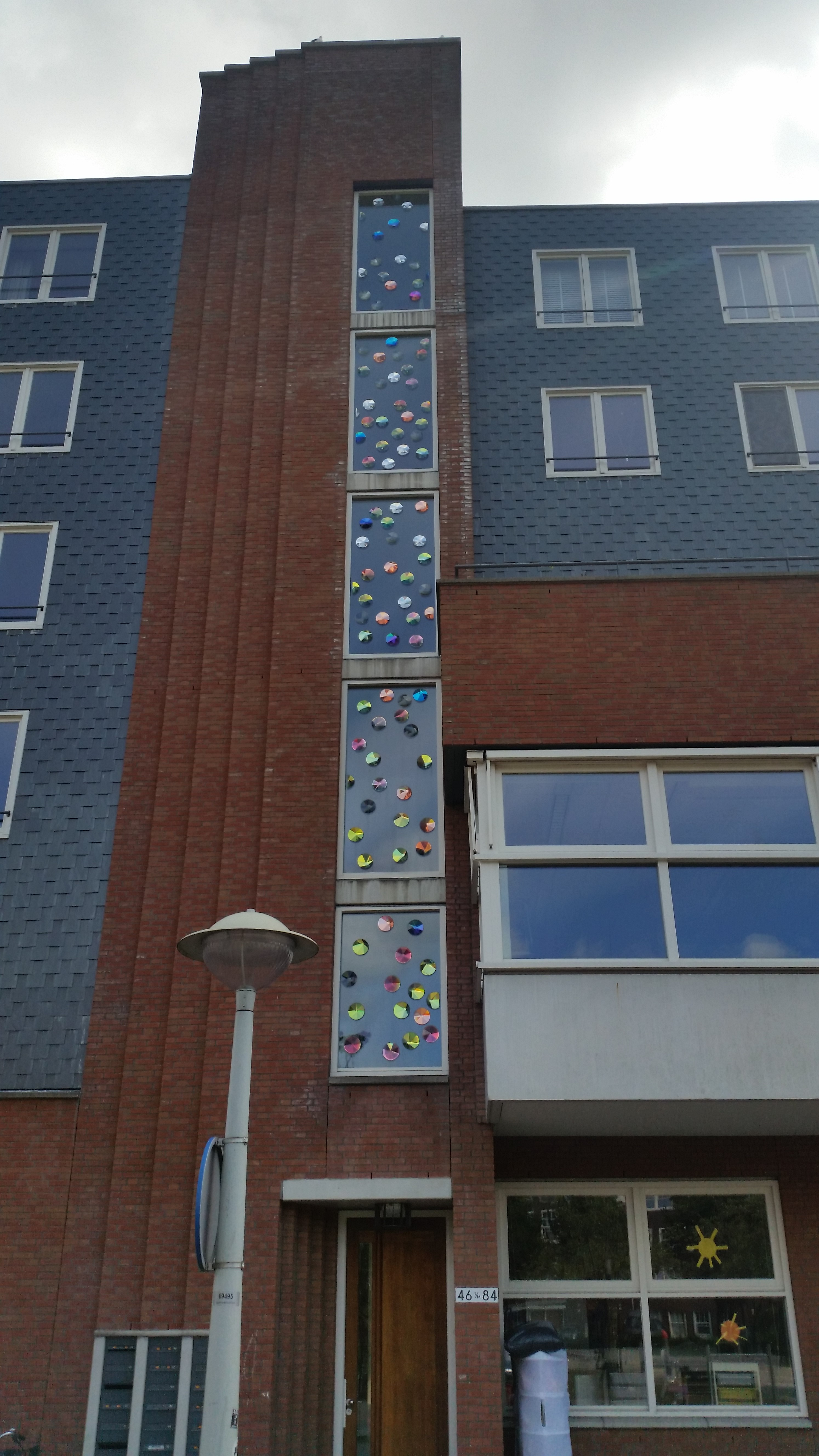 Werk van Suzan Drummern op Balboaplein 2-86, Amsterdam-West